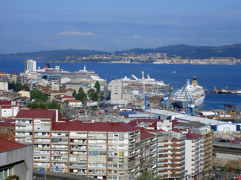 3 Trasatlanticos á vez en Vigo